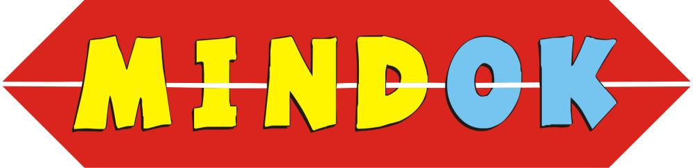 Logo Mindoku, před rokem 2012